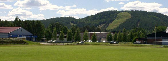 Vy “inifrån” Rimvallen med Bomyrberget och skidanläggningen i bakgrunden, Rimhallen till vänster i byn vuollerim i Norrbotten.